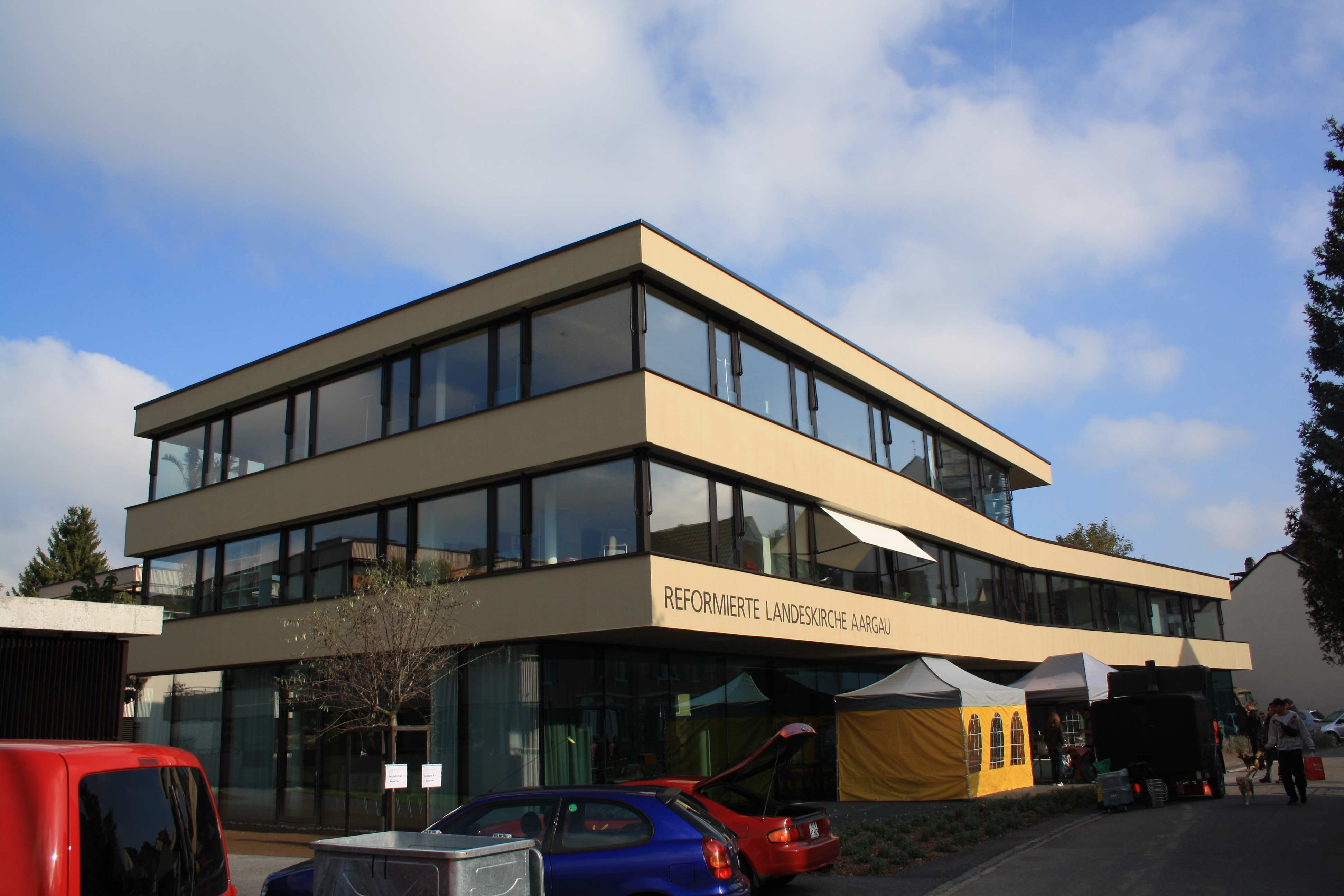 Das «Haus der Reformierten» - der neue Sitz der Reformierten Landeskirche Aargau im Stritegässli in Aarau